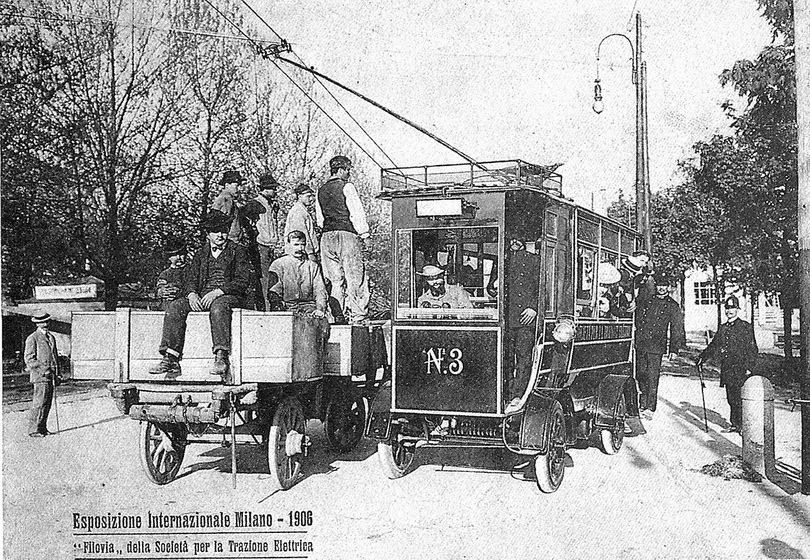 Trolleybus mit Cantono-Frigerio-Stromabnehmer bei der Weltausstellung in Mailand, 1906